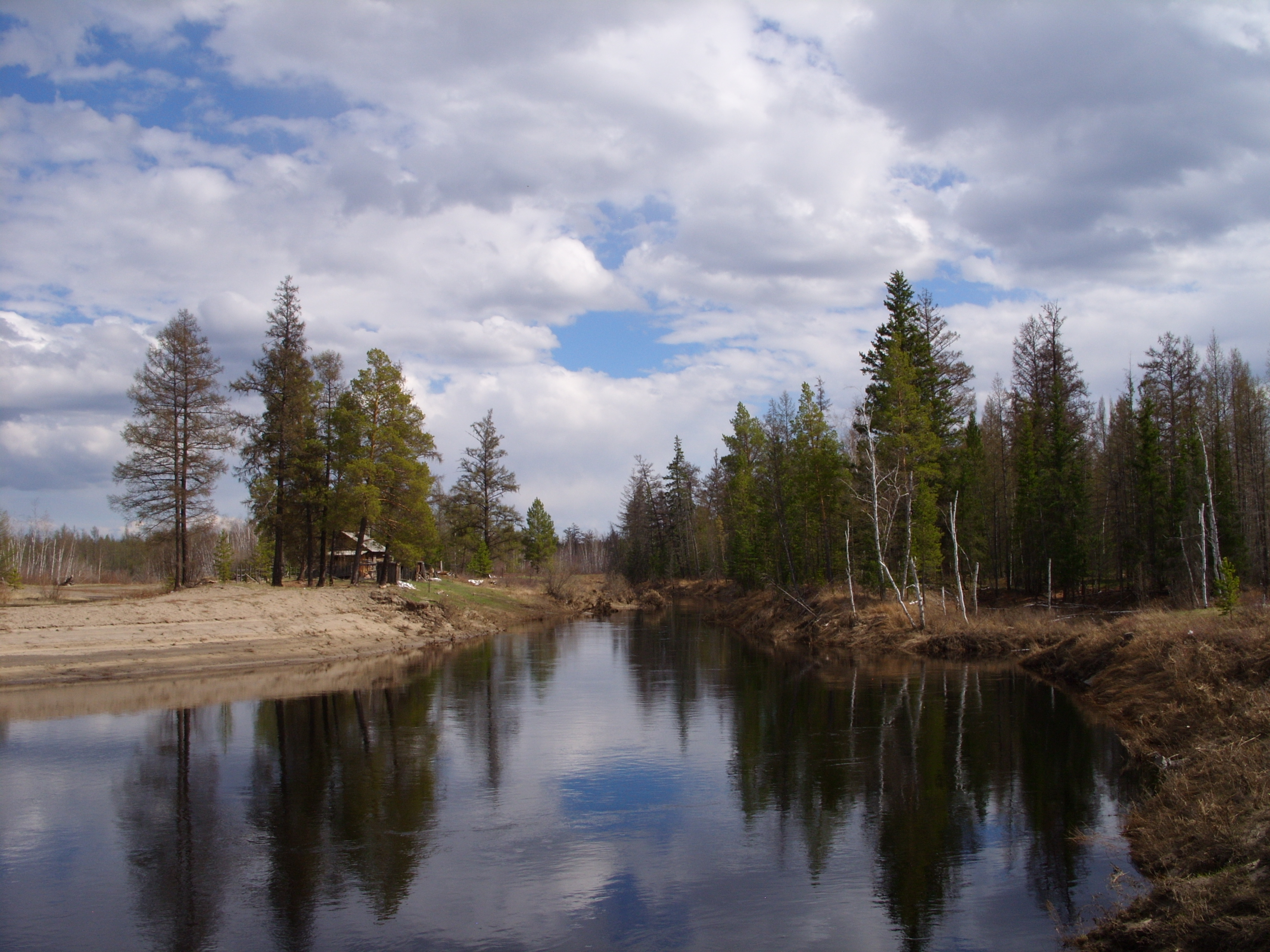 Возле автодорожного моста через р. Кенкеме на федеральной автодороге "Вилюй", 47 км к западу от Якутска